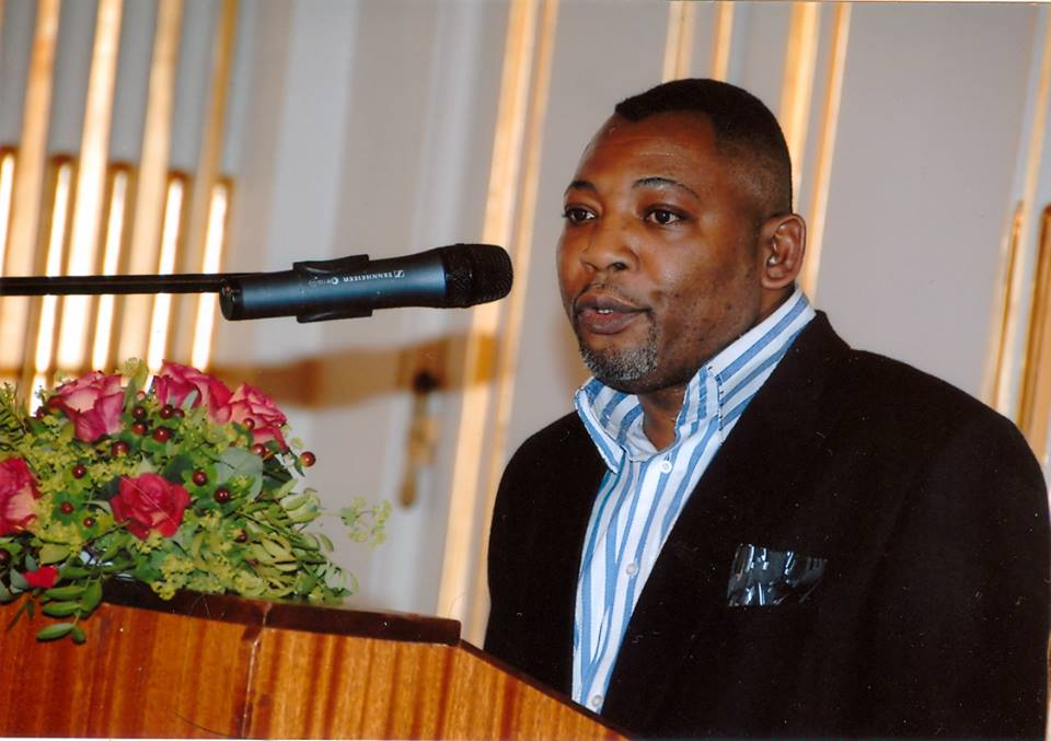 Fondateur